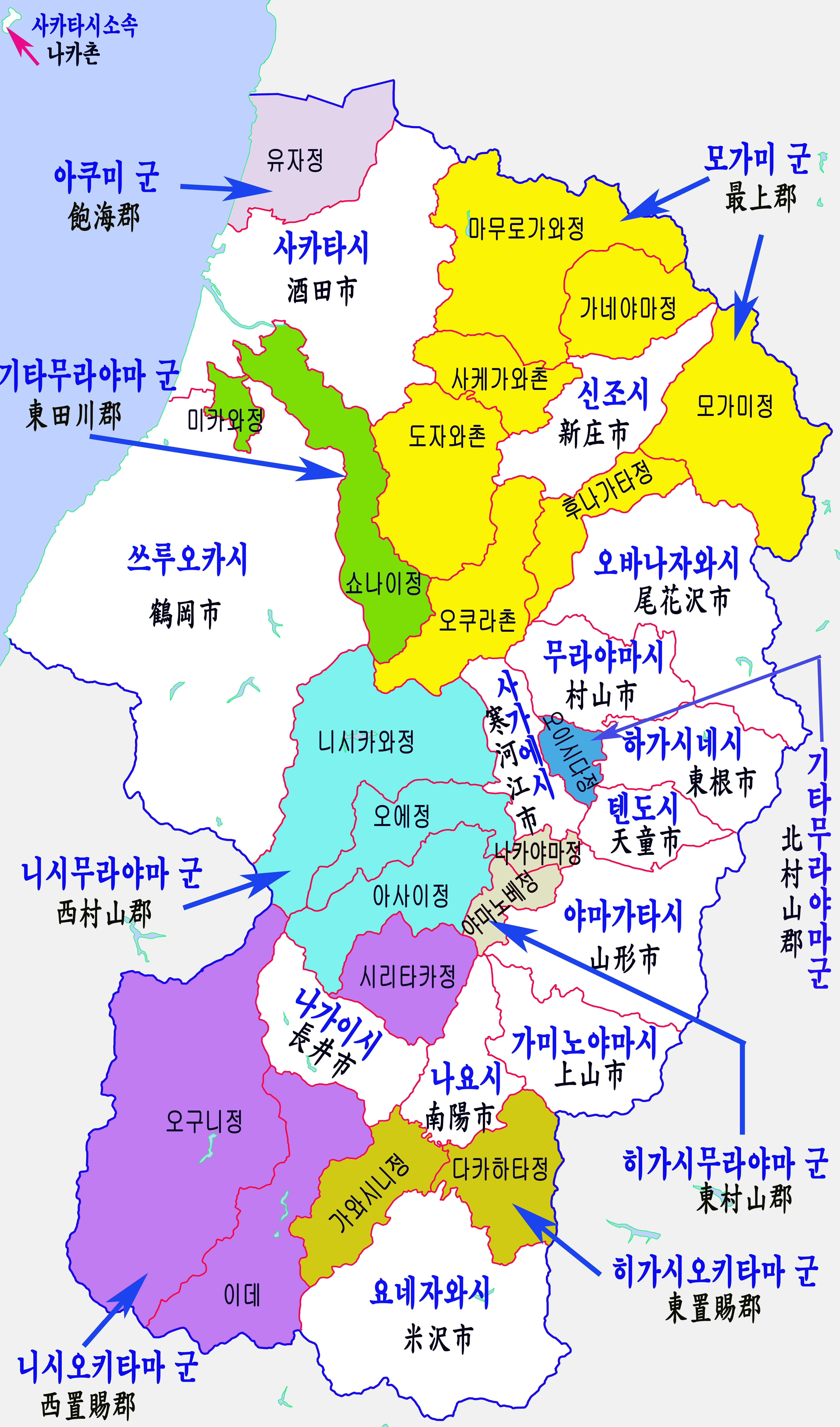 야마가타현 행정구역